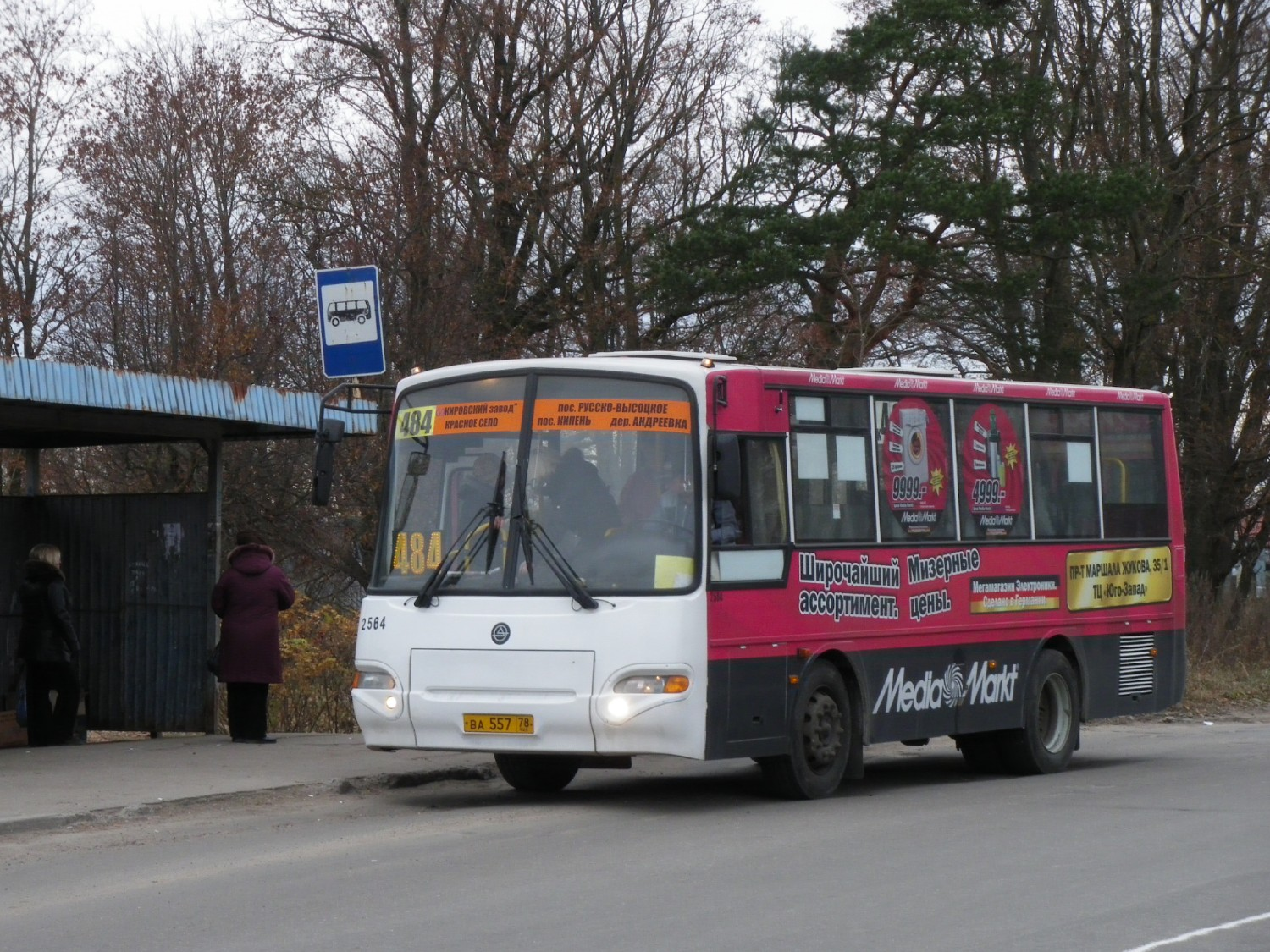 Россия, Ленинградская область, Ломоносовский район, село Русско-Высоцкое, остановка у больницы. Дата съёмки - 4 ноября 2009 г. Автор - Роговиков Николай.